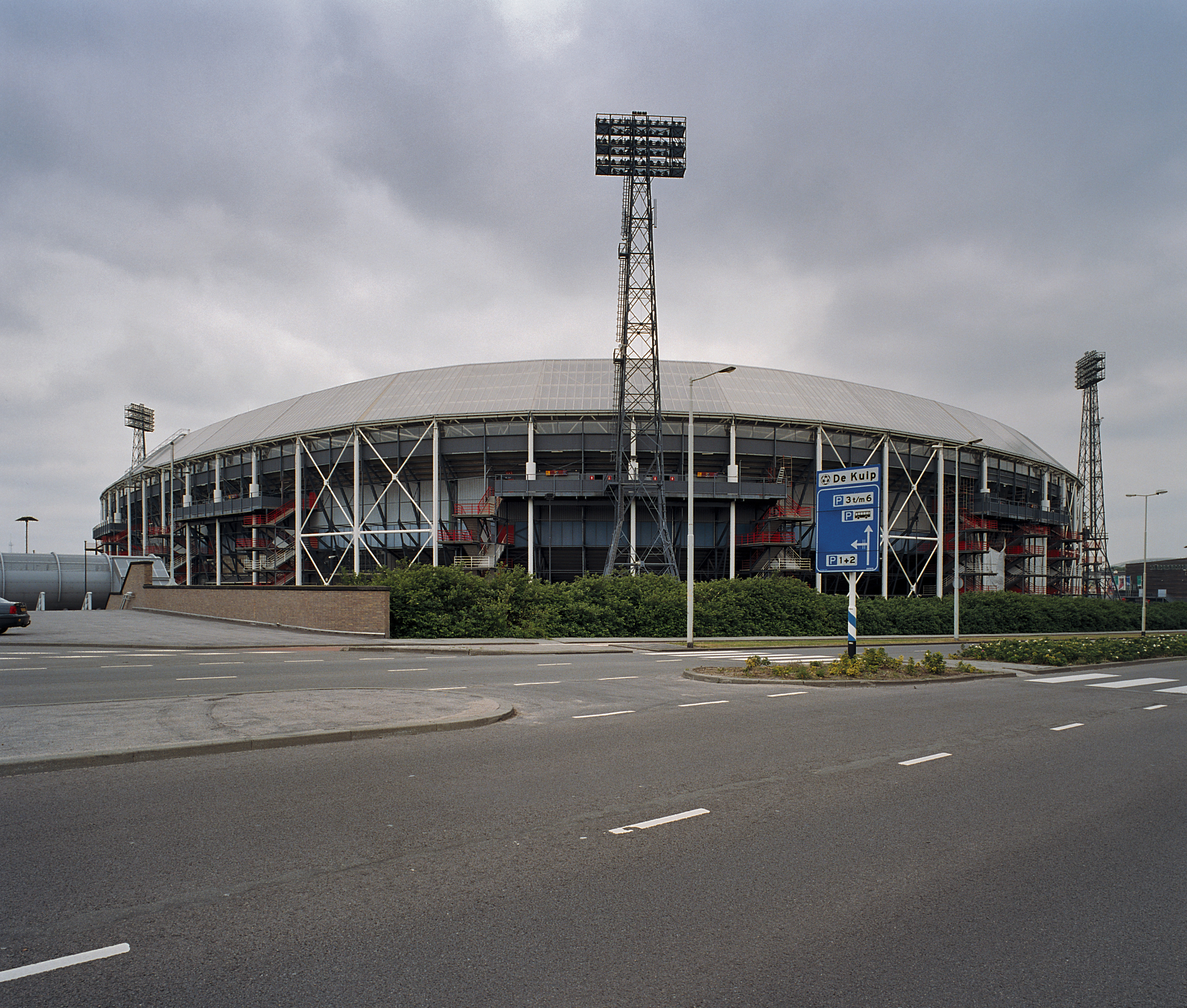 Stadion Feyenoord - voetbalstadion - De Kuip: Overzicht vanaf de straat (opmerking: Gefotografeerd voor ANWB Monumentenboek)